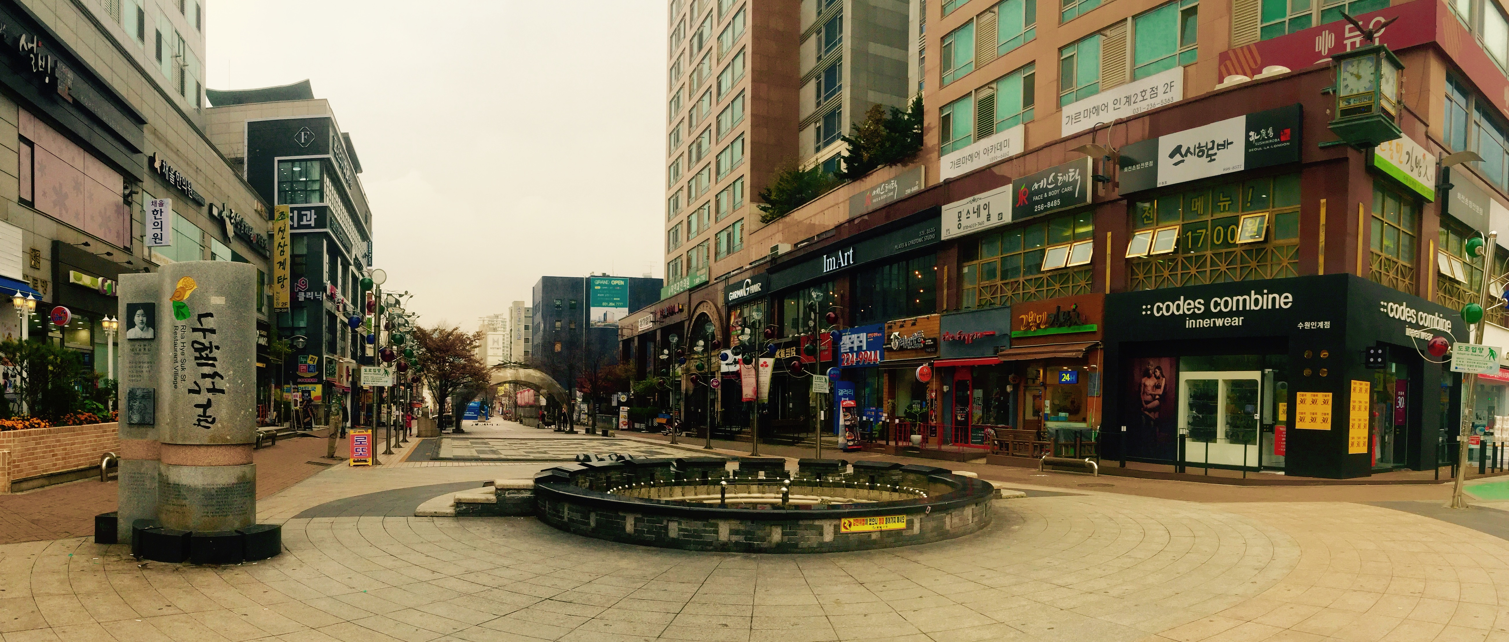 대한민국 경기도 수원시 팔달구 인계동 나혜석 거리